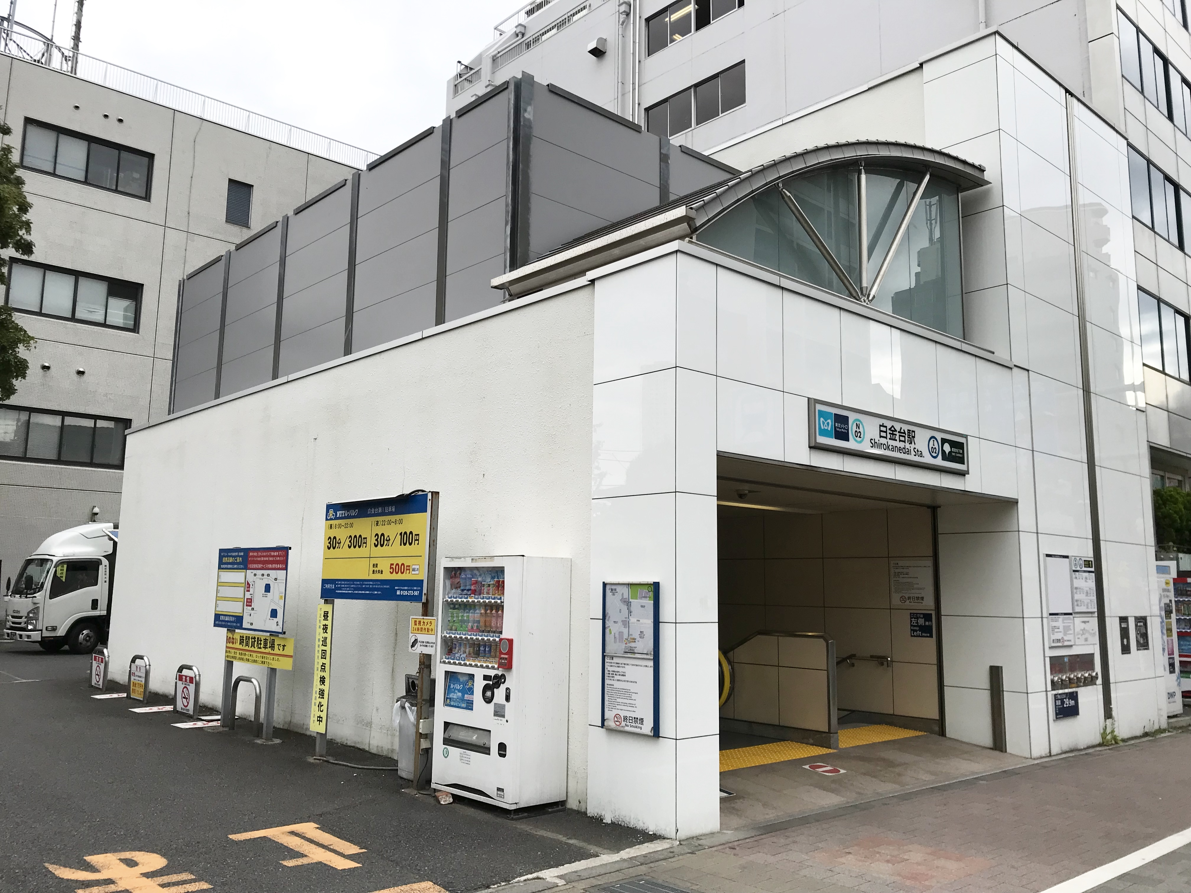 東京メトロ南北線・都営地下鉄三田線白金台駅1番出入口